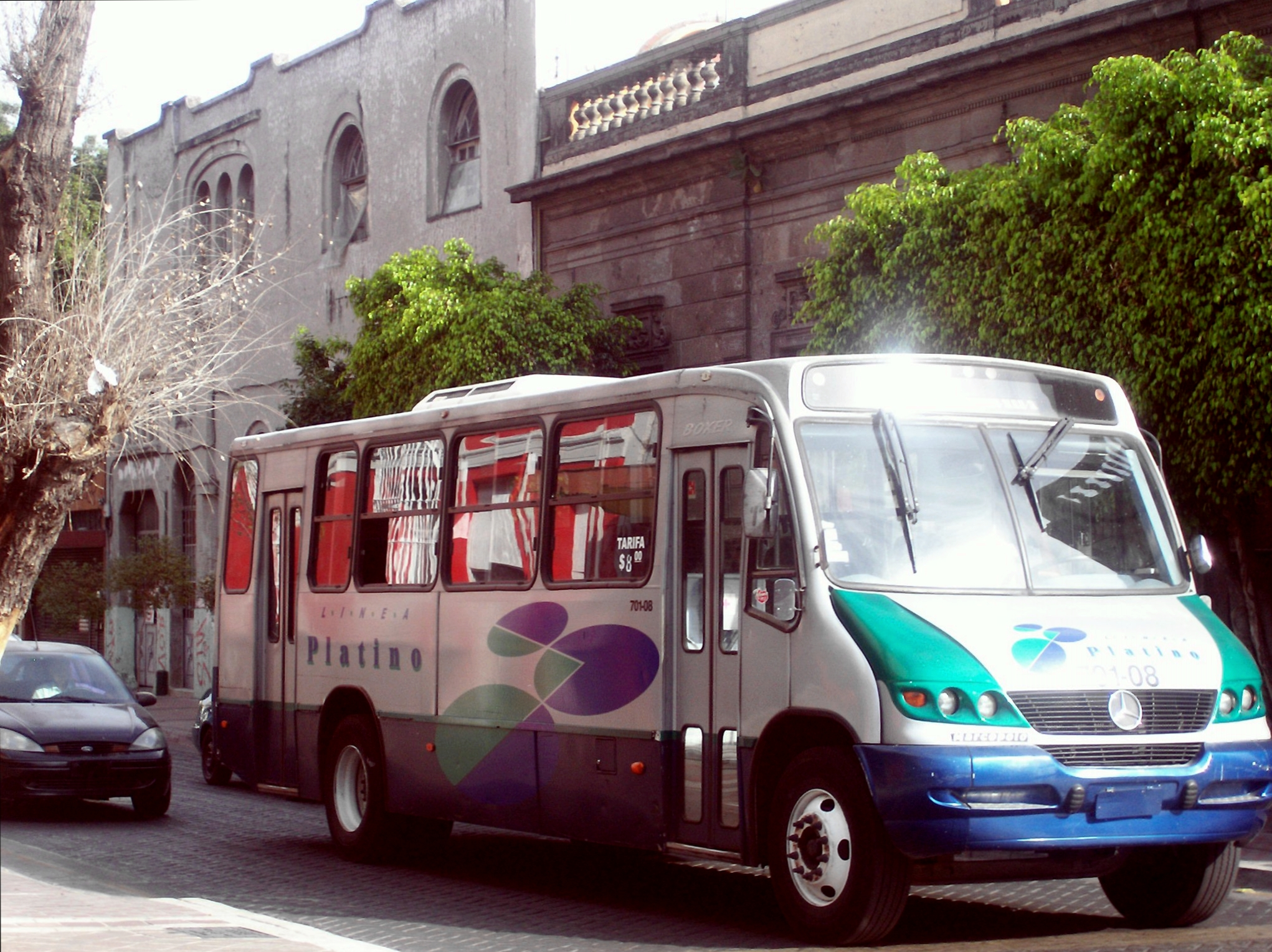 Autobus de lujo linea platino